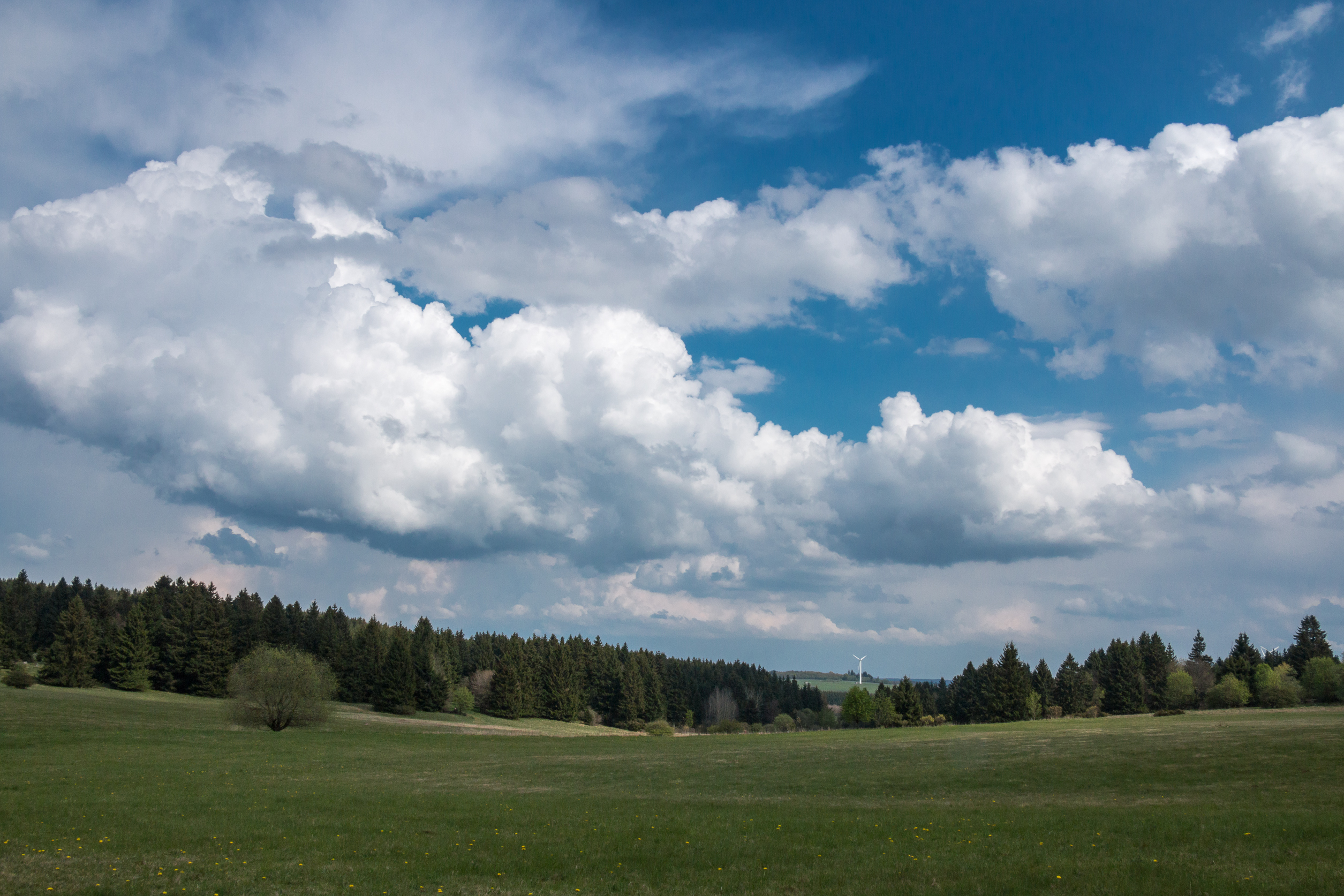 Hoch-Heidelandschaft im Sattel zwischen der Nord- und Südkuppe der Fuchskaute, der höchsten Erhebung des Westerwaldes, Naturschutzgebiet Fuchskaute